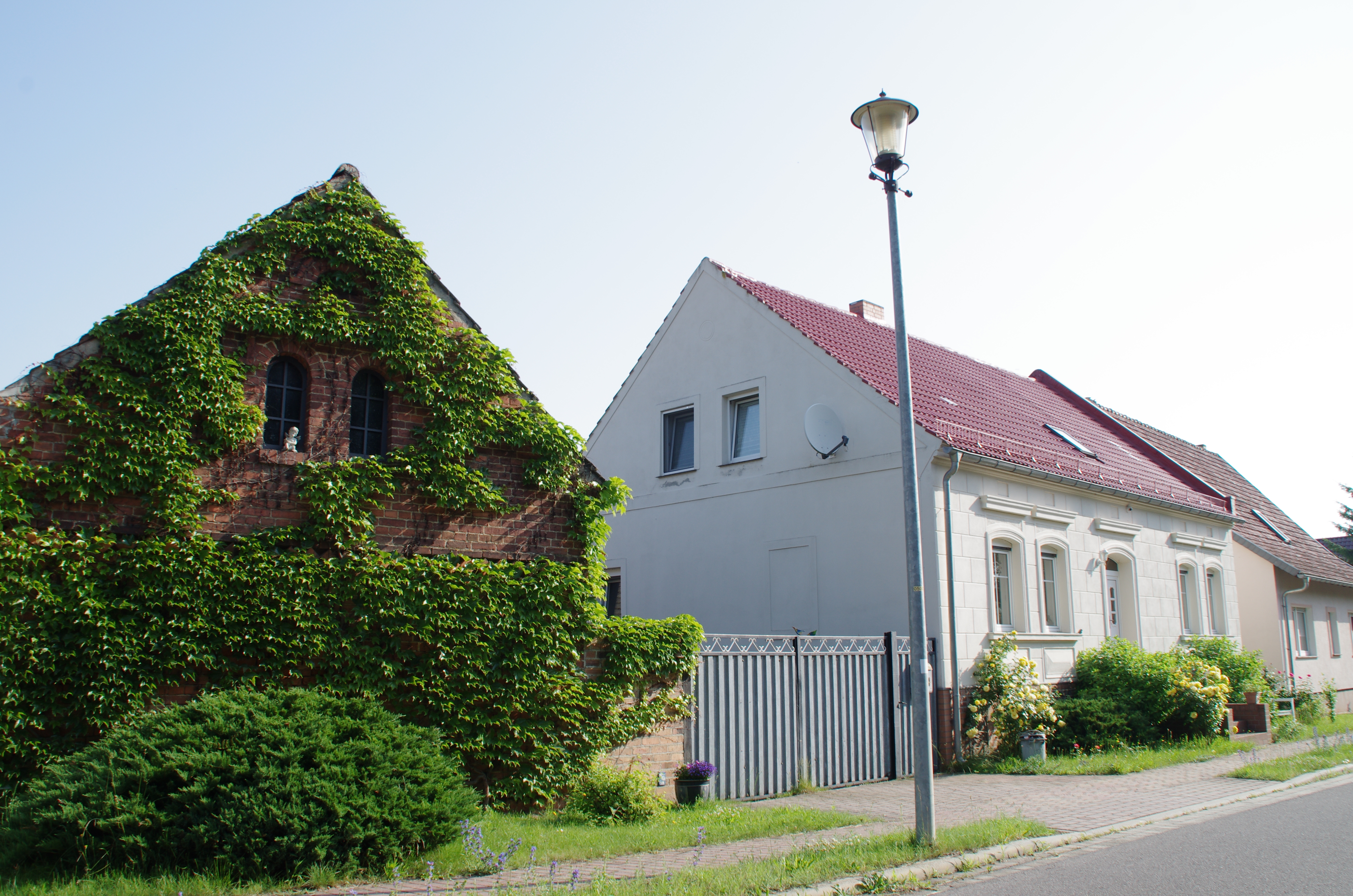 Luckau Ortsteil Gießmanndorf in Brandenburg. Das Haus in der Straße Lindenstraße 24 steht unter Denkmalschutz.